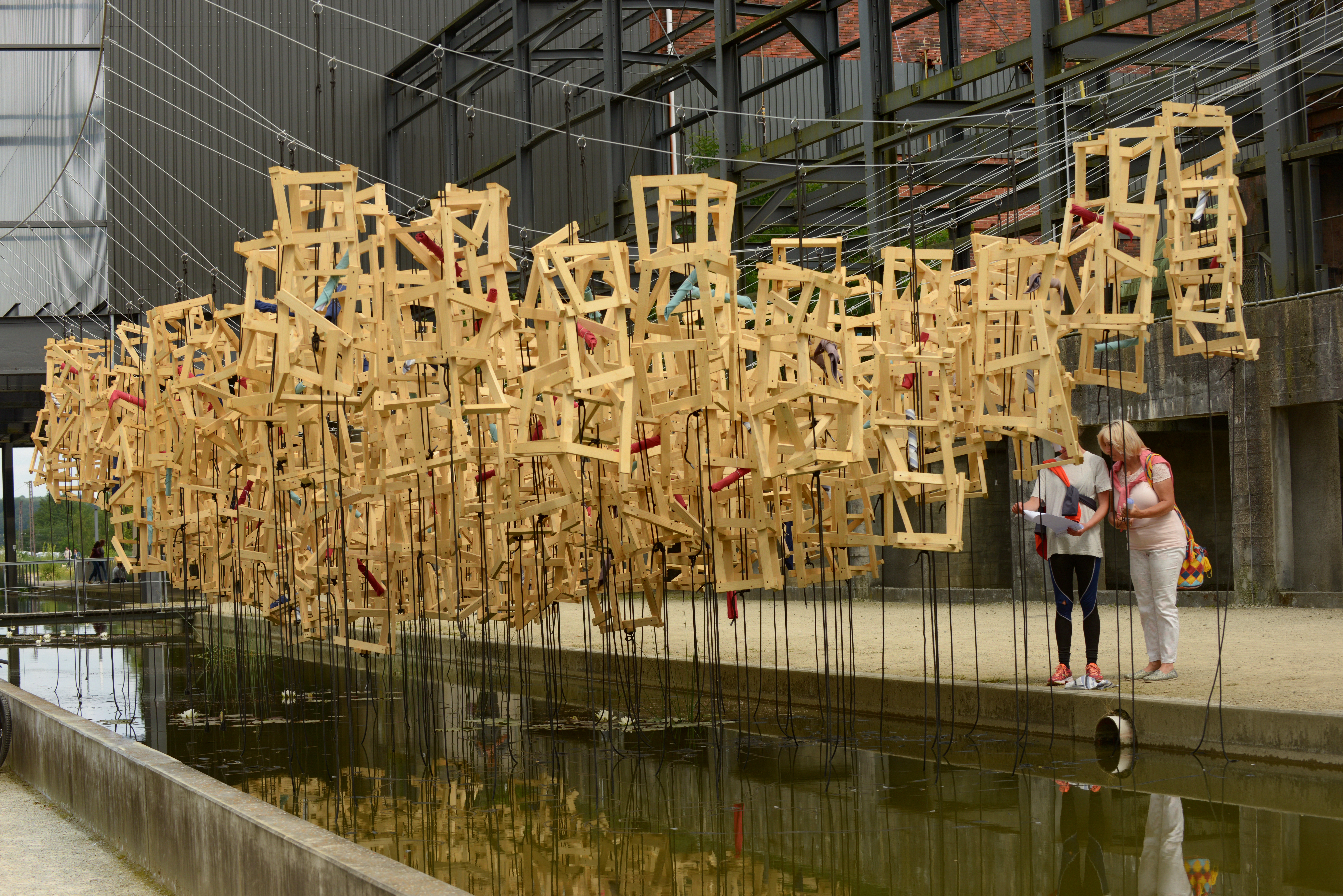 Der saarländische Künstler Martin Steinert zeigt in Landsweiler an der Grube Reden, ehemaliges Steinkohlebergwerk, sein Projekt "Kumpel" zum Ende des Bergbaus in Deutschland. Mit Latten gebaute Körbe stellen die Waschkaue in den Gruben nach, dem intimsten Ort der Bergleute. Am 30.06.18 wird Martin Steinert auch in Essen (Zeche Zollverein) seine Körbe installieren. Landsweiler/ Reden, Gemeinde Schiffweiler, Saarland/ Deutschland (2018).